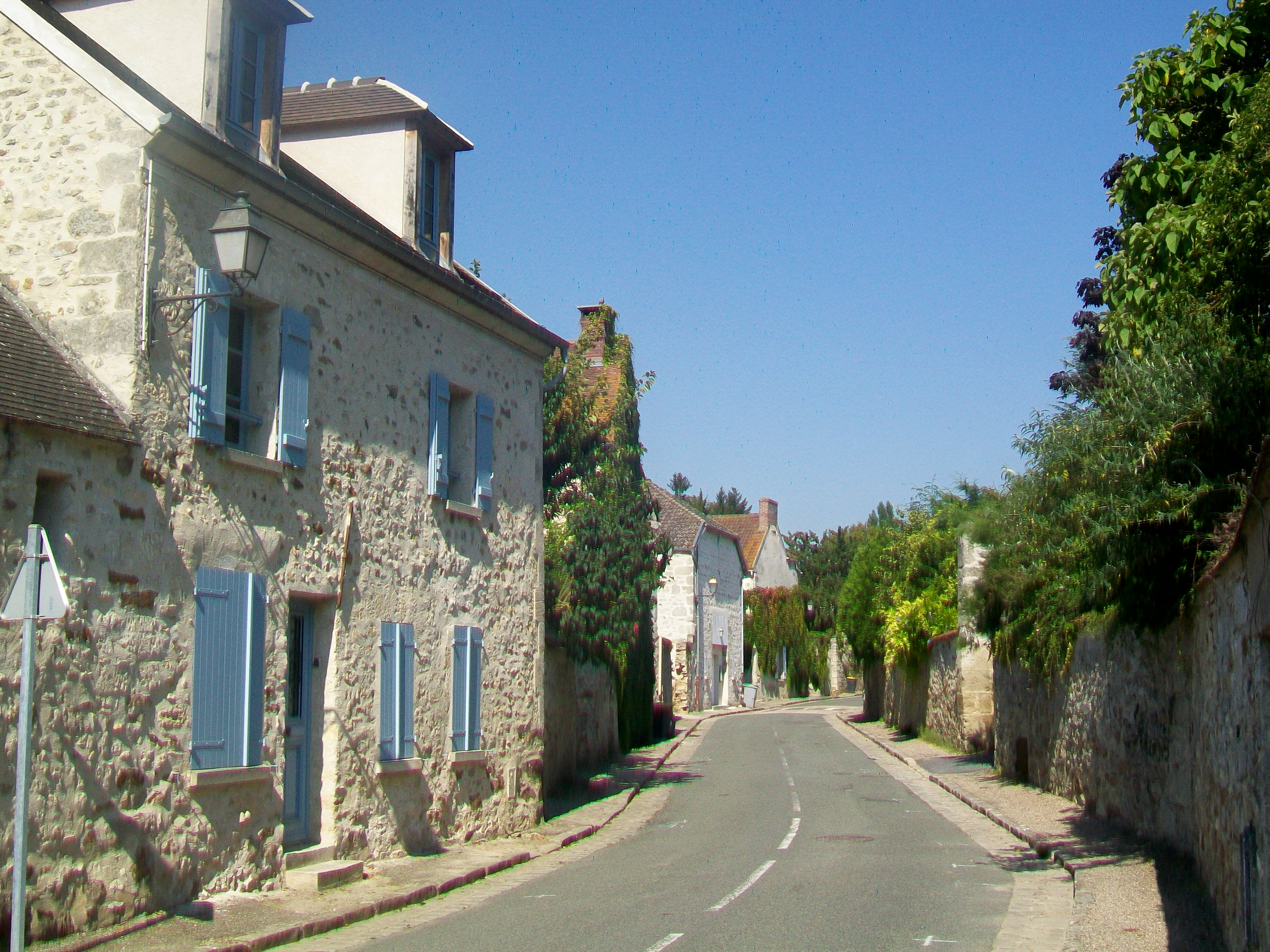 Partie ouest de la rue Saint-Romain.